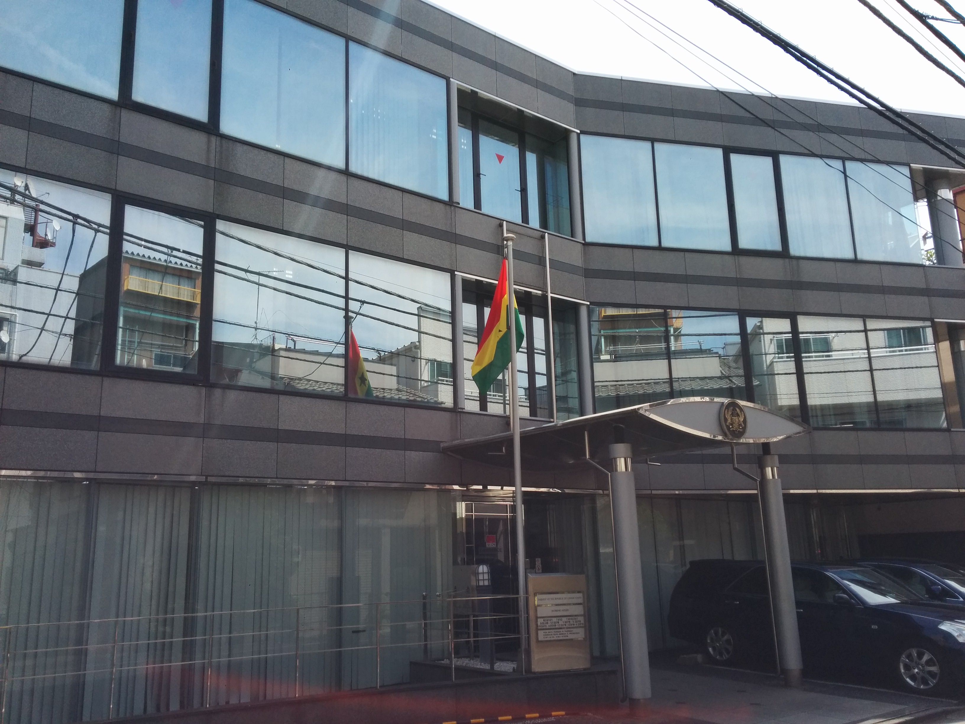 Sunny day